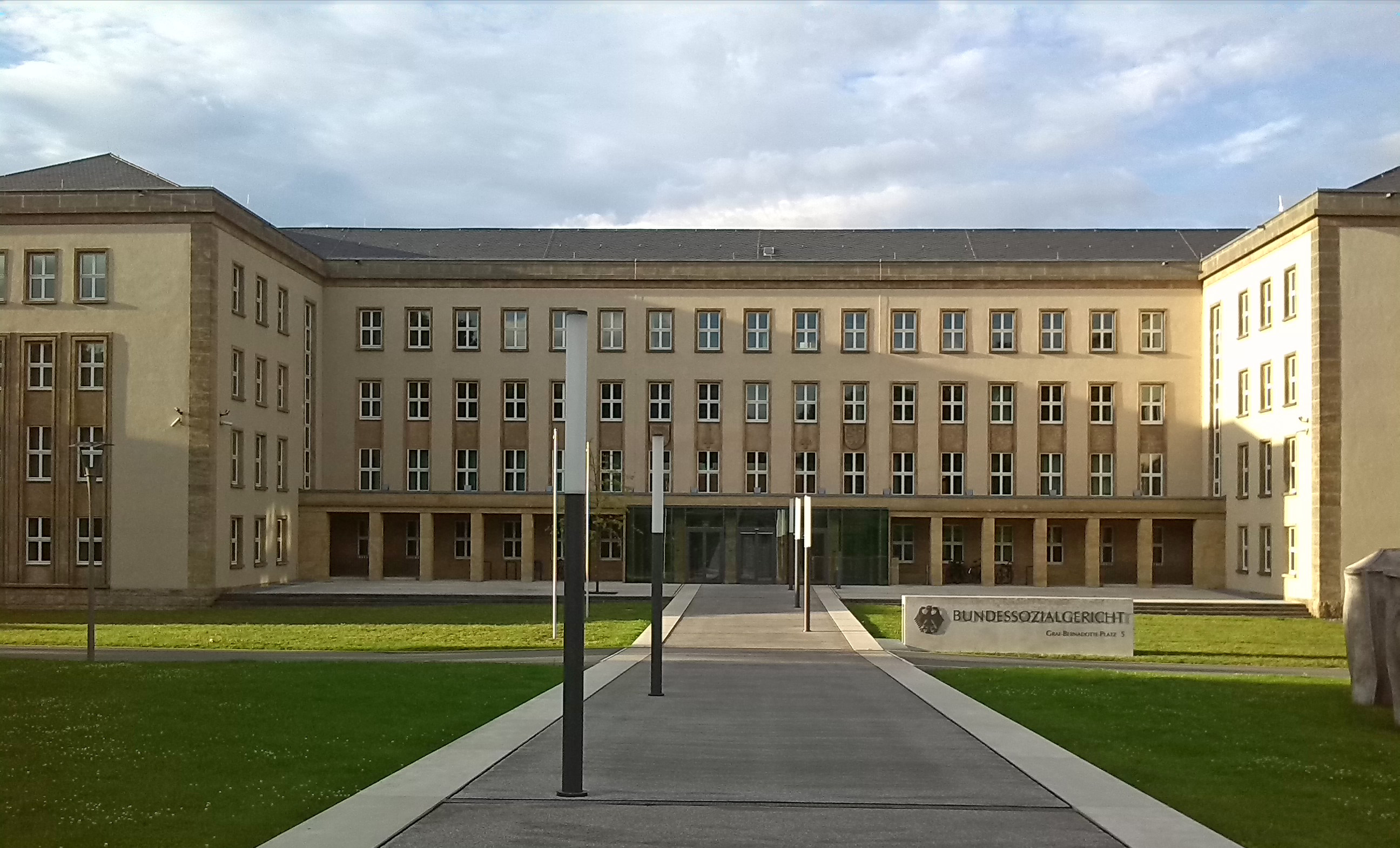 Bundesozialgericht